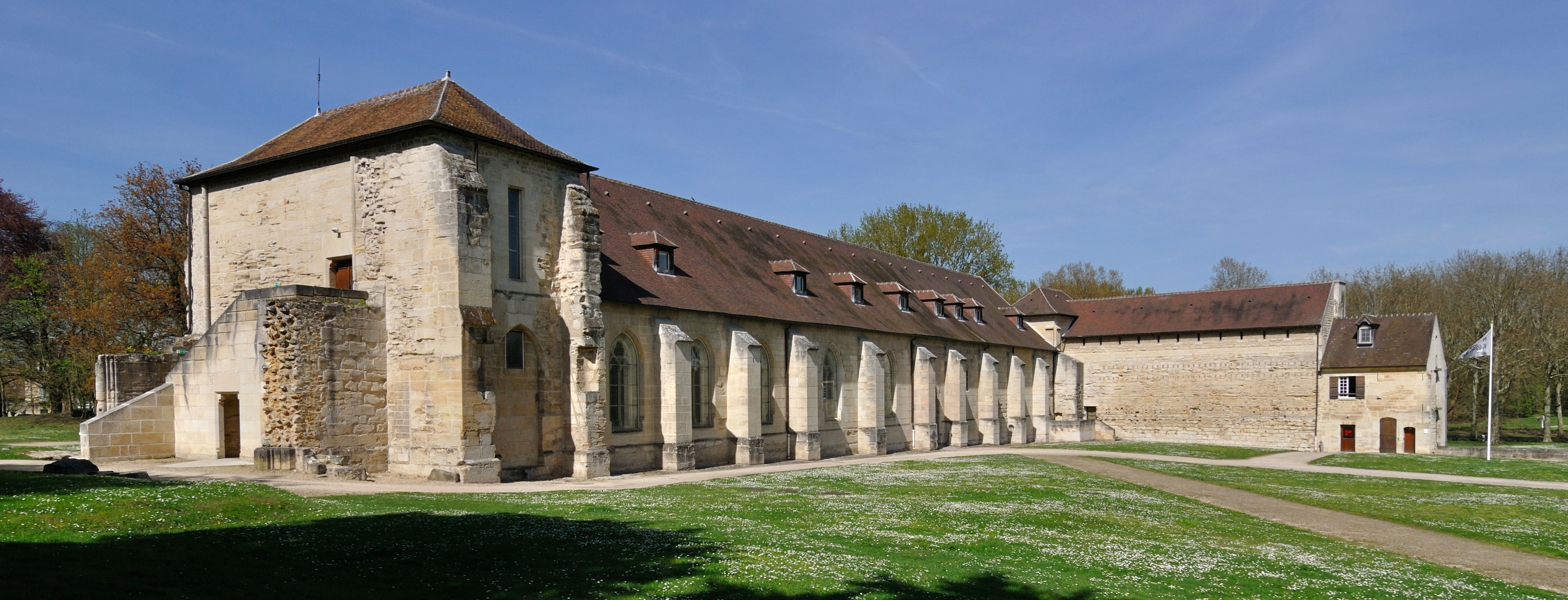 Abbaye de Maubuisson - printemps 2011